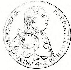 Münze mit dem Abbild des Fürsten Karl Joachim zu Fürstenberg